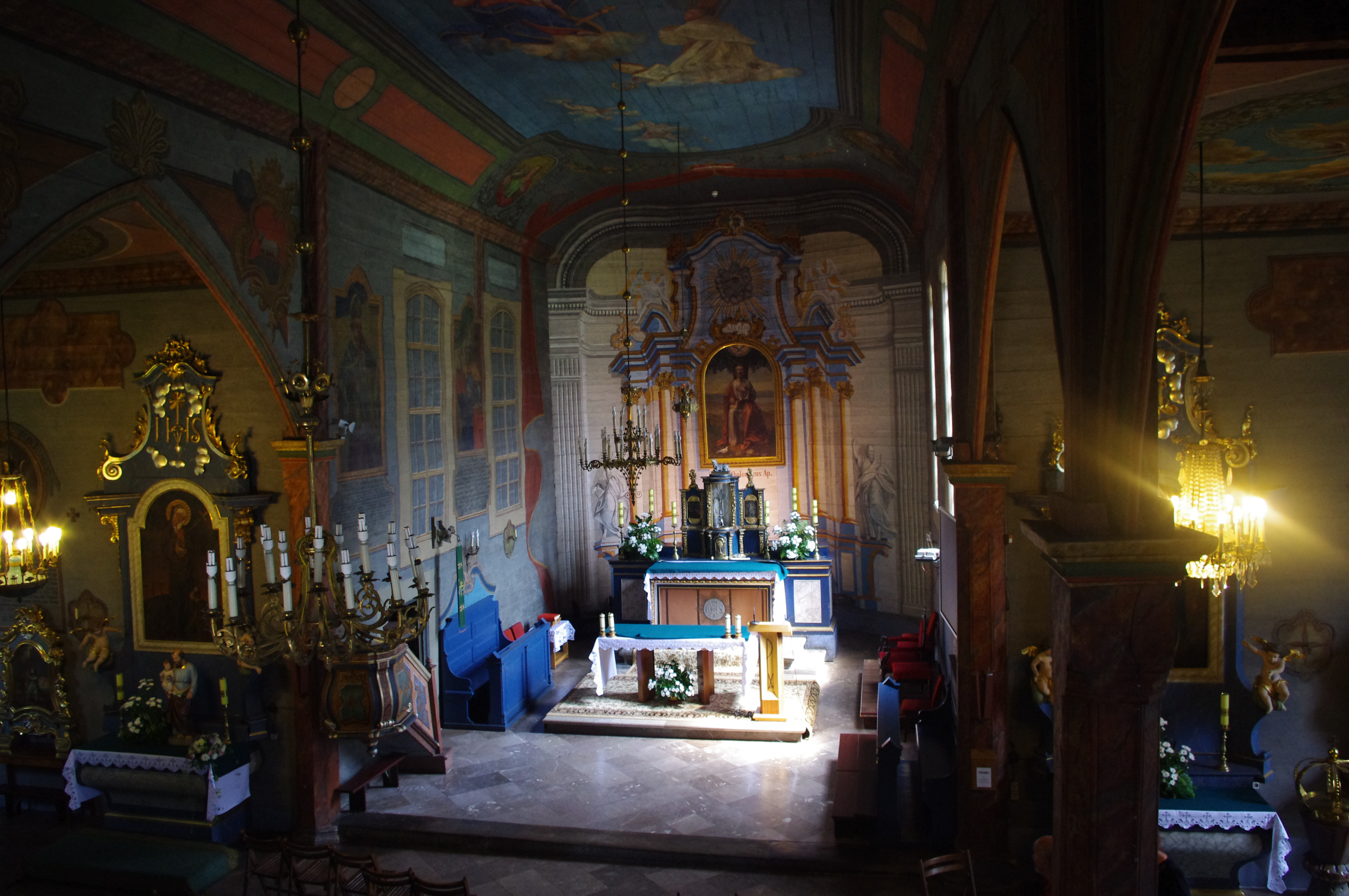 Wnętrze kościoła św.Bartłmieja w Krakowie/ St.Bartholomew Church in Kraków